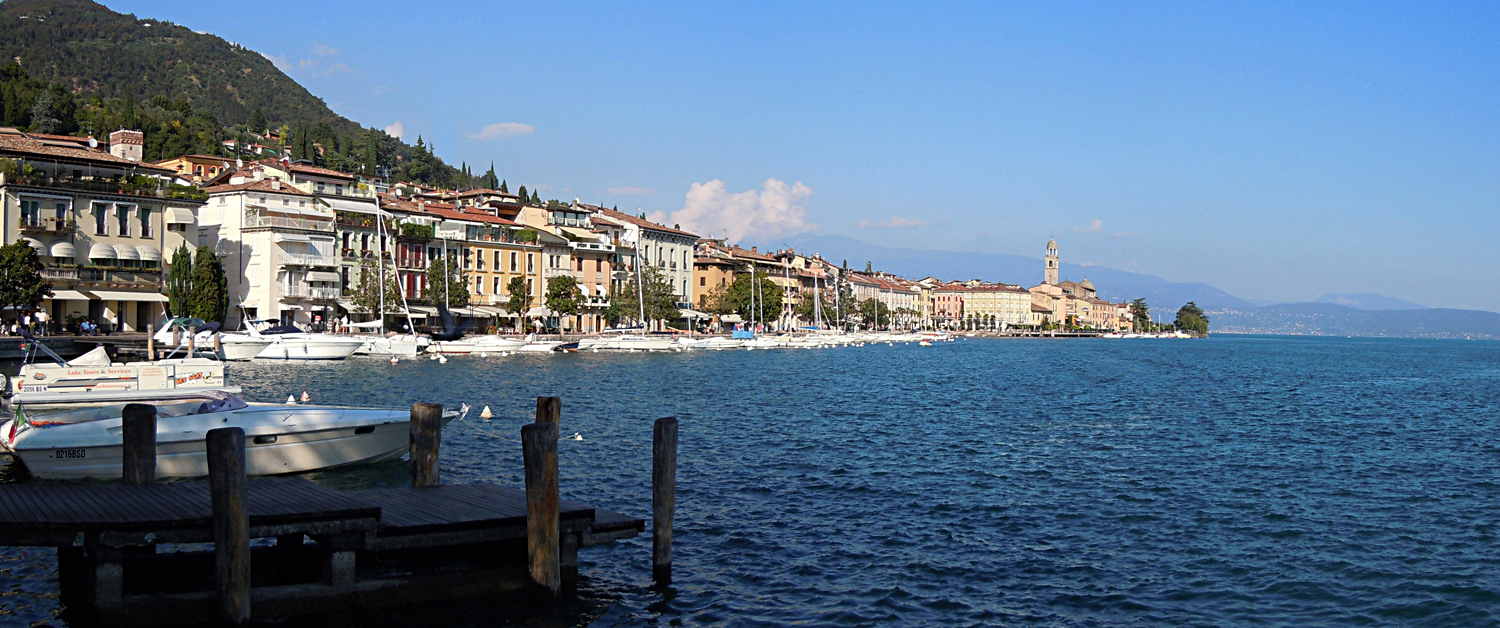 Panorama di Salò.